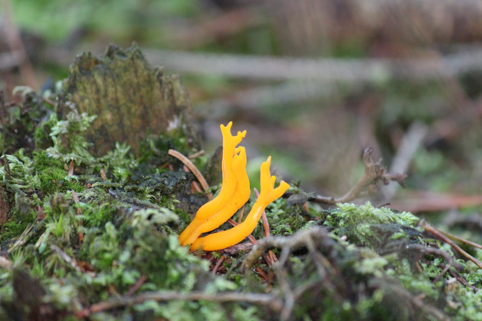 Schleimpilz , unbekannt, im Morgengrauen, im Naturschutzgebiet Obere Lachte, Kainbach, Jafelbach, NSG BR 098